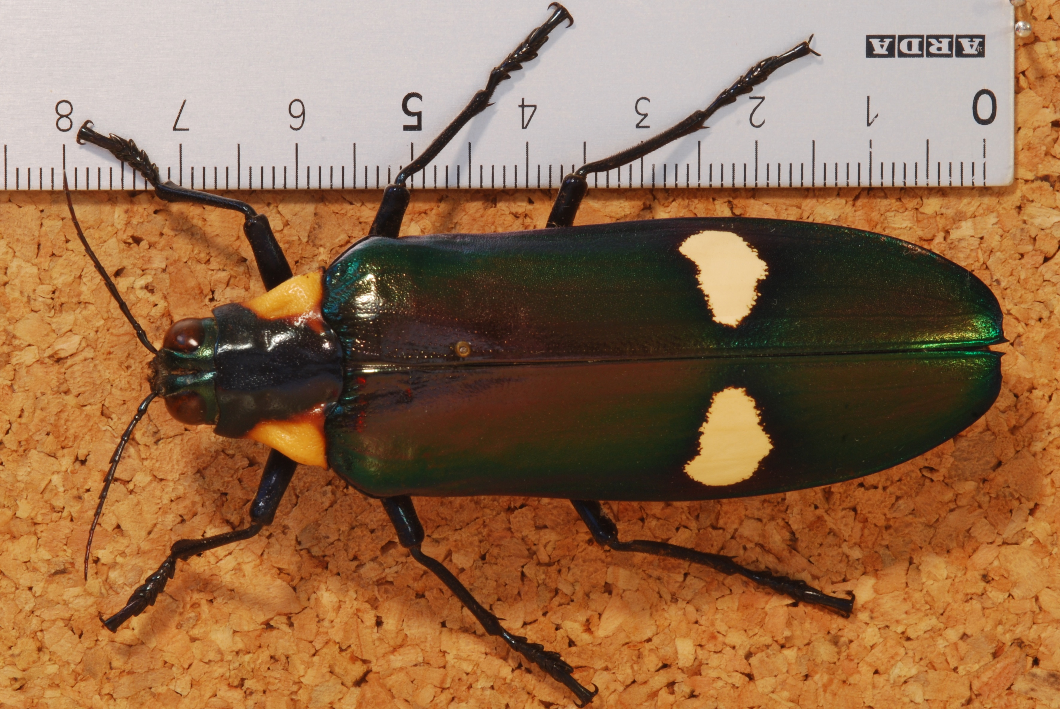 San Sai, Chiang Mai, THAILAND